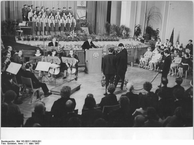 Mestlin, Jugendweihe, Feierstunde Zentralbild Eckleben Eckl.-r 11.3.1963 Erste Jugendweihe des Jahres 1963 in Mestlin Im festlich geschmückten Kultursaal von Mestlin, Kreis Parchin, erlebten am 10.3.1963 hunderte Einwohner dieses mecklenburgischen Dorfes die erste Jugendweihe des Jahres 1963. In einer würdigen Feierstunde legten 21 Mädchen und Jungen ihr feierliches Gelöbnis für ihren Arbeiter- und Bauern-Staat ab. Das Mitglied des Zentralkomitees und 1. Sekretär der SED-Bezirksleitung Schwerin, Bernhard Quandt, hielt die Festansprache. (Weiterer Text in der ADN-Meldung Nr. 78-206 vom 10.3.1963) UBz: Während der Festrede Bernhard Quandts. Die Feierstunde wurde vom Chor der Volkspolizei Parchim und dem Orchester "Collegium Musicum" umrahmt.